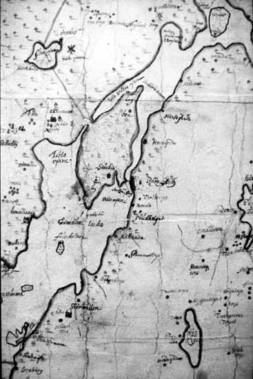 Del av karta över Järfälla omkr 1690. Original i Lantmäteriverket, Gävle, sign A 10. Bild nr 13303 i Järfälla kommuns bilddatabas.